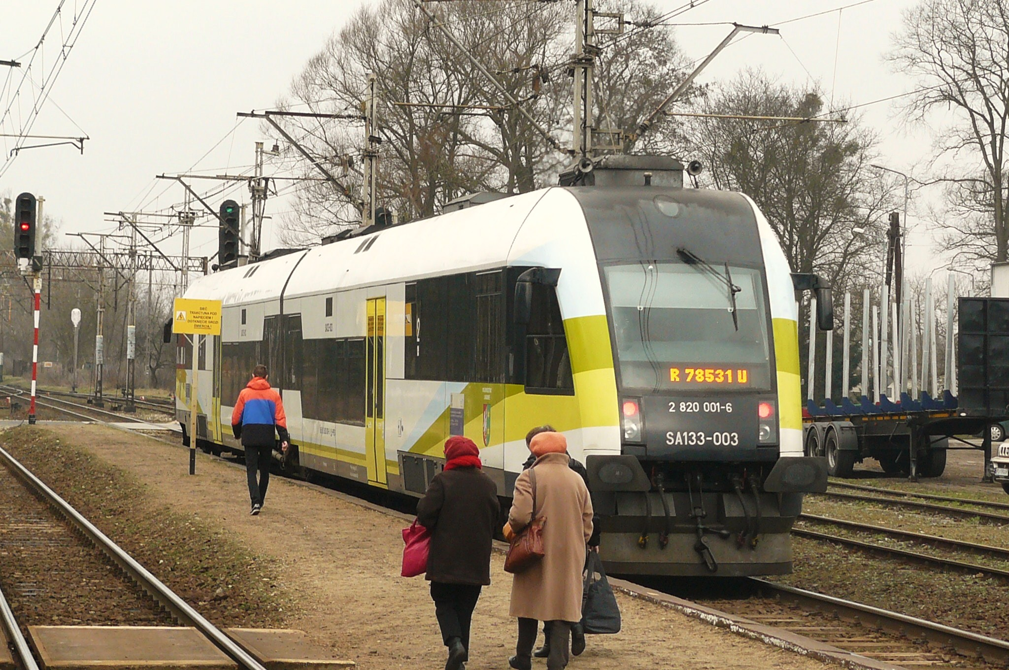 SA133-003 w Miałach (Pń - Kostrzyn).